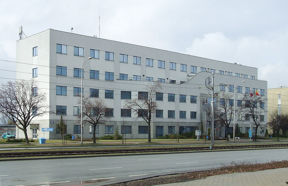 Urząd dzielnicy Włochy w Warszawie